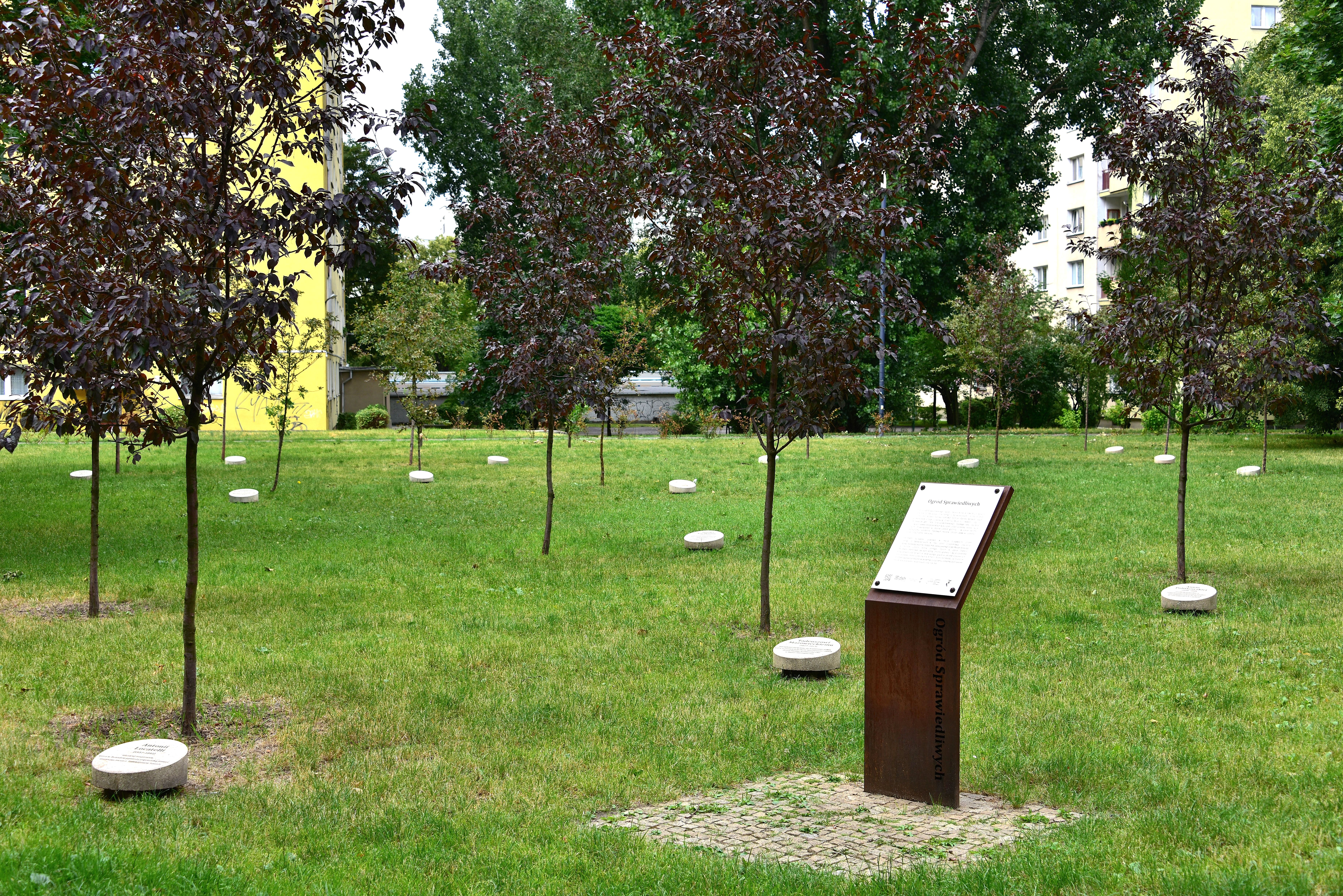 Ogród Sprawiedliwych w Warszawie